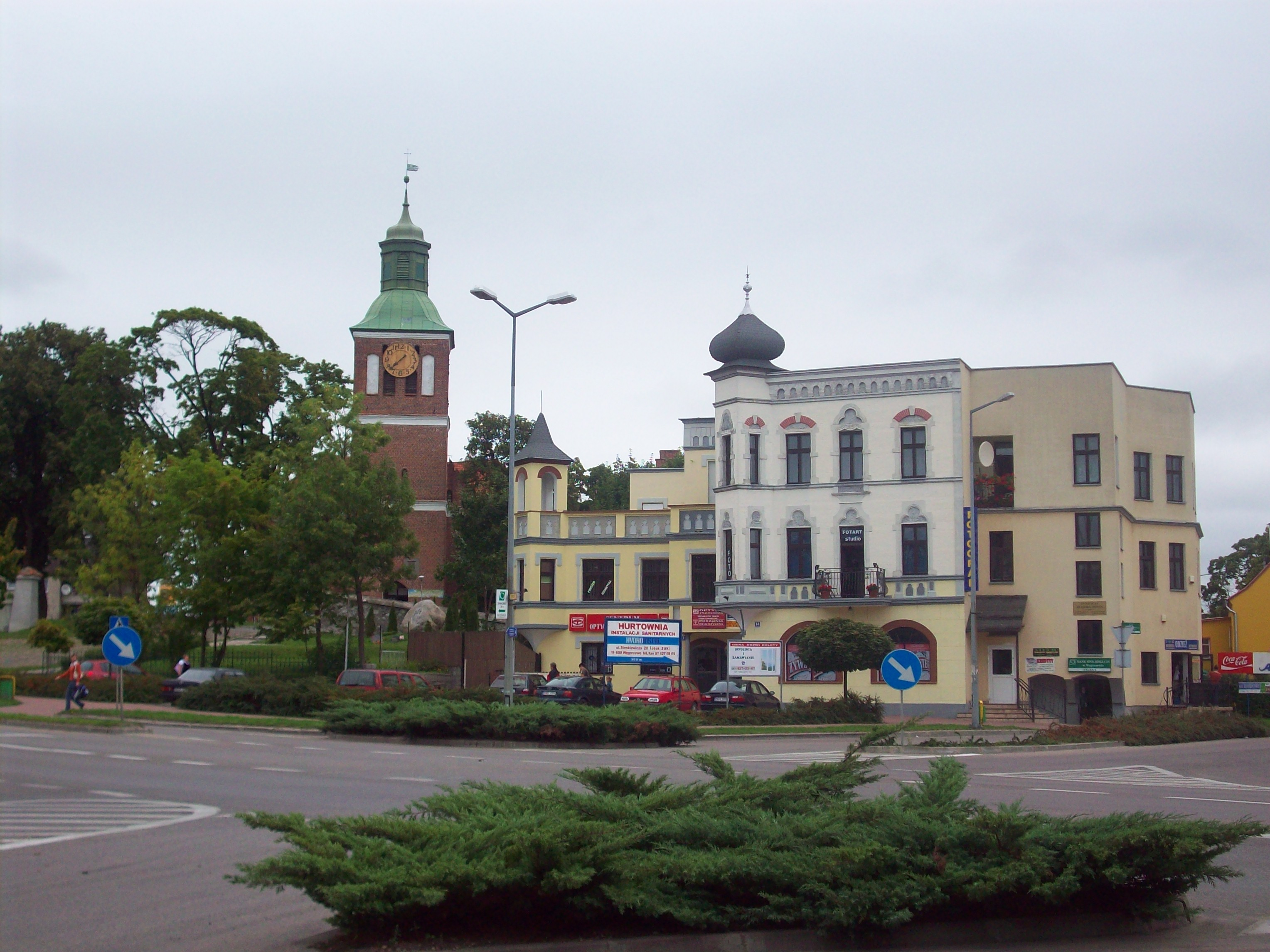 Węgorzewo, ul. Zamkowa 14 (róg ul. Sienkiewicza) - budynek wielofunkcyjny